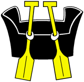 Wappen von Näfels, Kanton Glarus, Schweiz.Das alte Wappen ist ein abgerundeter Zuber mit runden Paddeln, das derzeit aktuelle hat unten abgeschnittene Ruder und ist in der Form eleganter und originale Abbildung des Wappens von 1604, Original im Freulerpalast Näfels / Museum des Landes Glarus auf Wappenscheibe. Durch Gemeinderat und Regierungsrat genehmigt 1988.